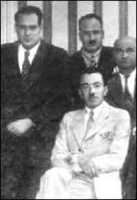 تصنيف:صور ملكية عامة - مصر